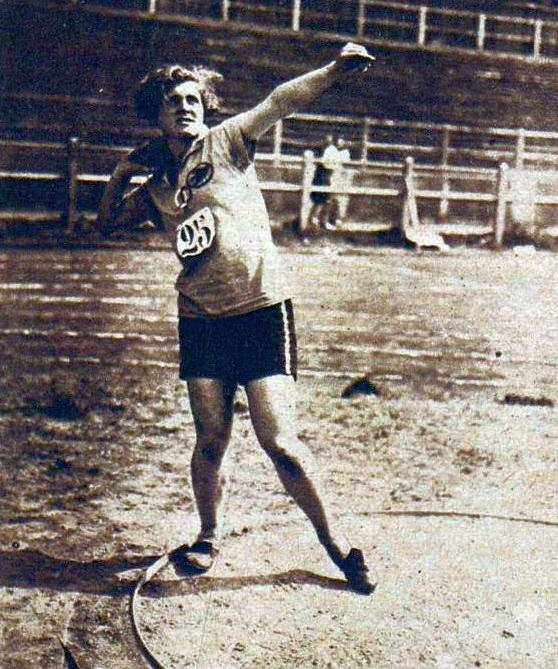 Lucienne Velu en juillet 1928.